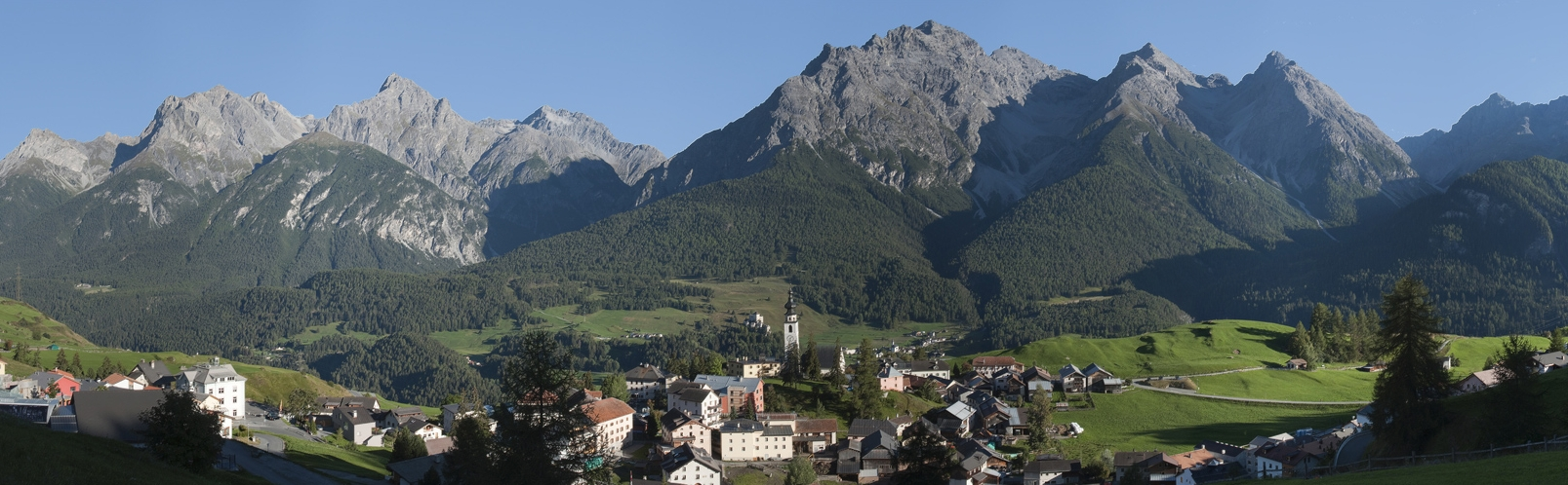 Panorama Unterengadin von Ftan aus: Lischana-Gruppe und Pisoc-Gruppe